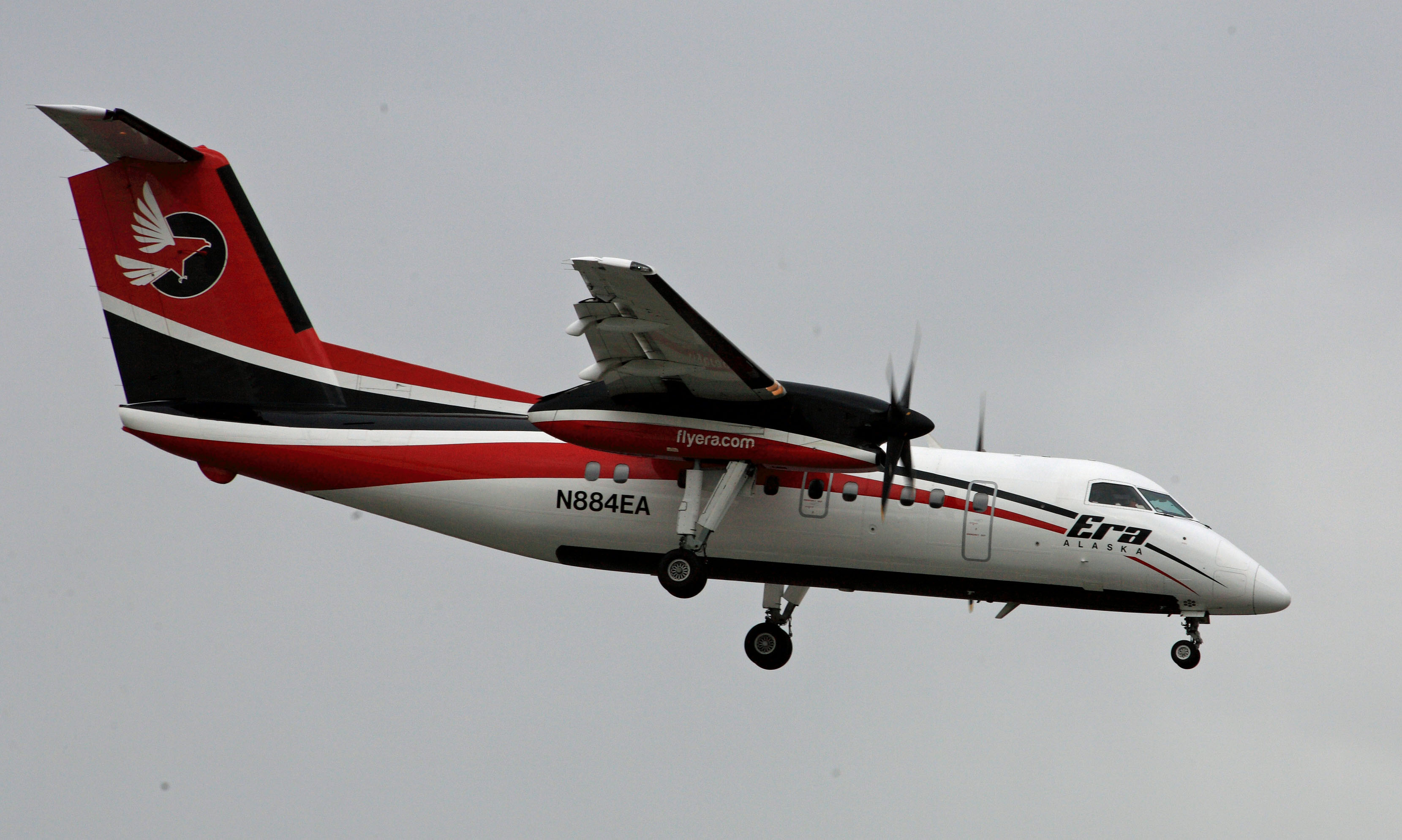 Era Alaska Dash 8-Q100/Q200 landing at ANC